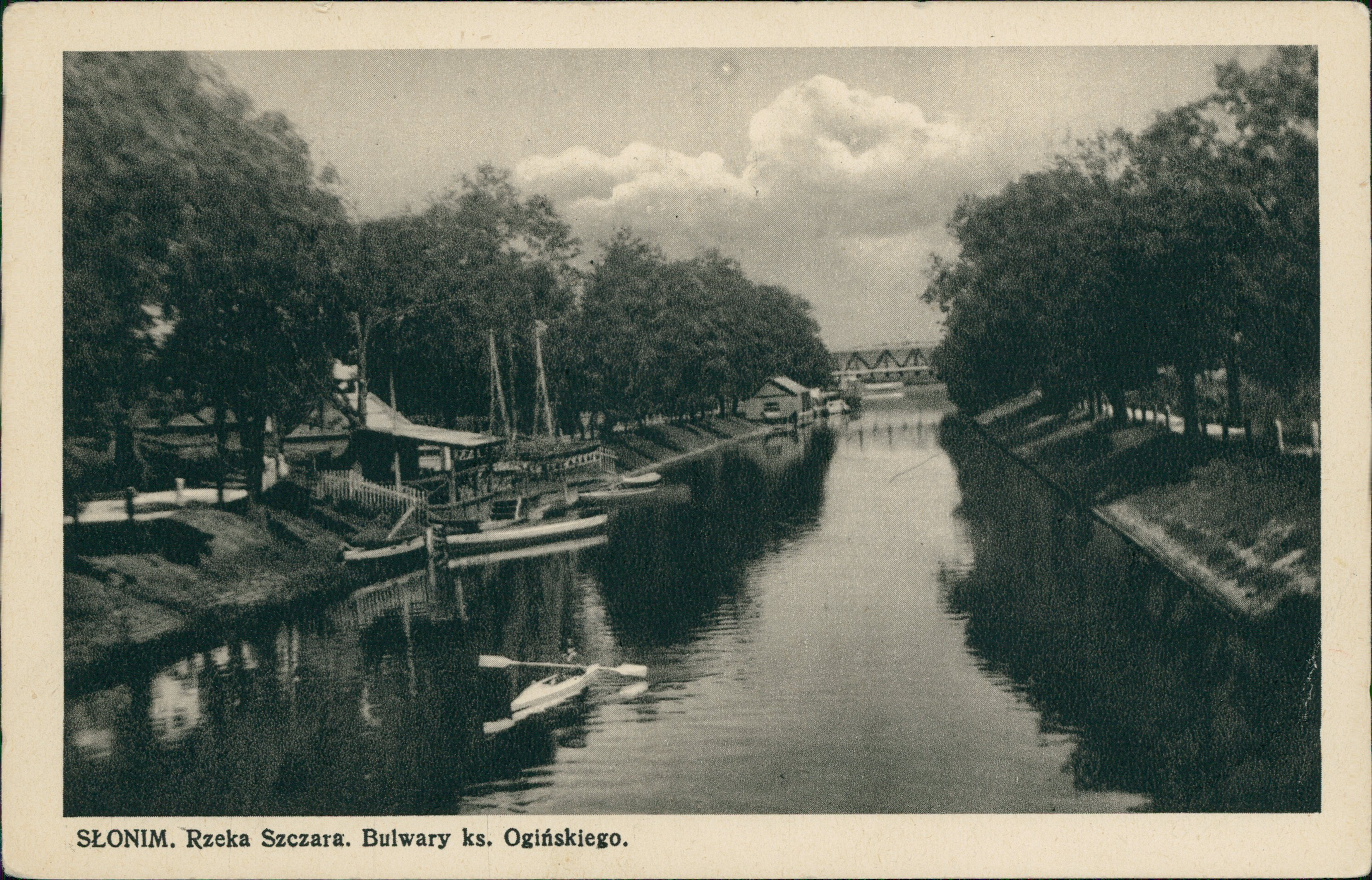 Беларуская (тарашкевіца): Слонім (Słonim), рака Шчара (Ščara). Бульвары князя Агінскага (Aginski)